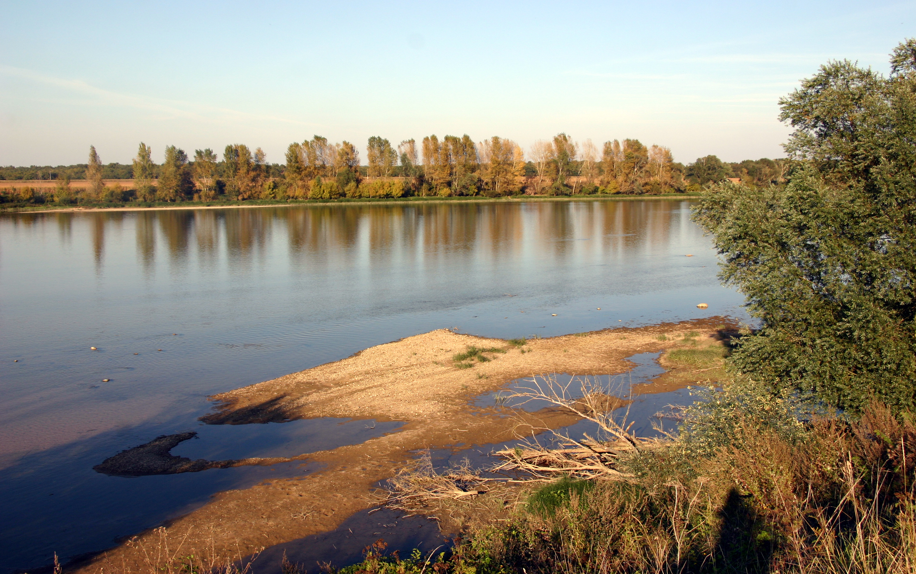 Loire bei Sully-sur-Loire